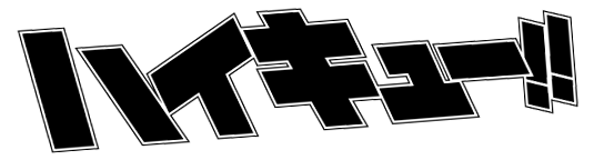 Logo dell'anime Haikyuu!!